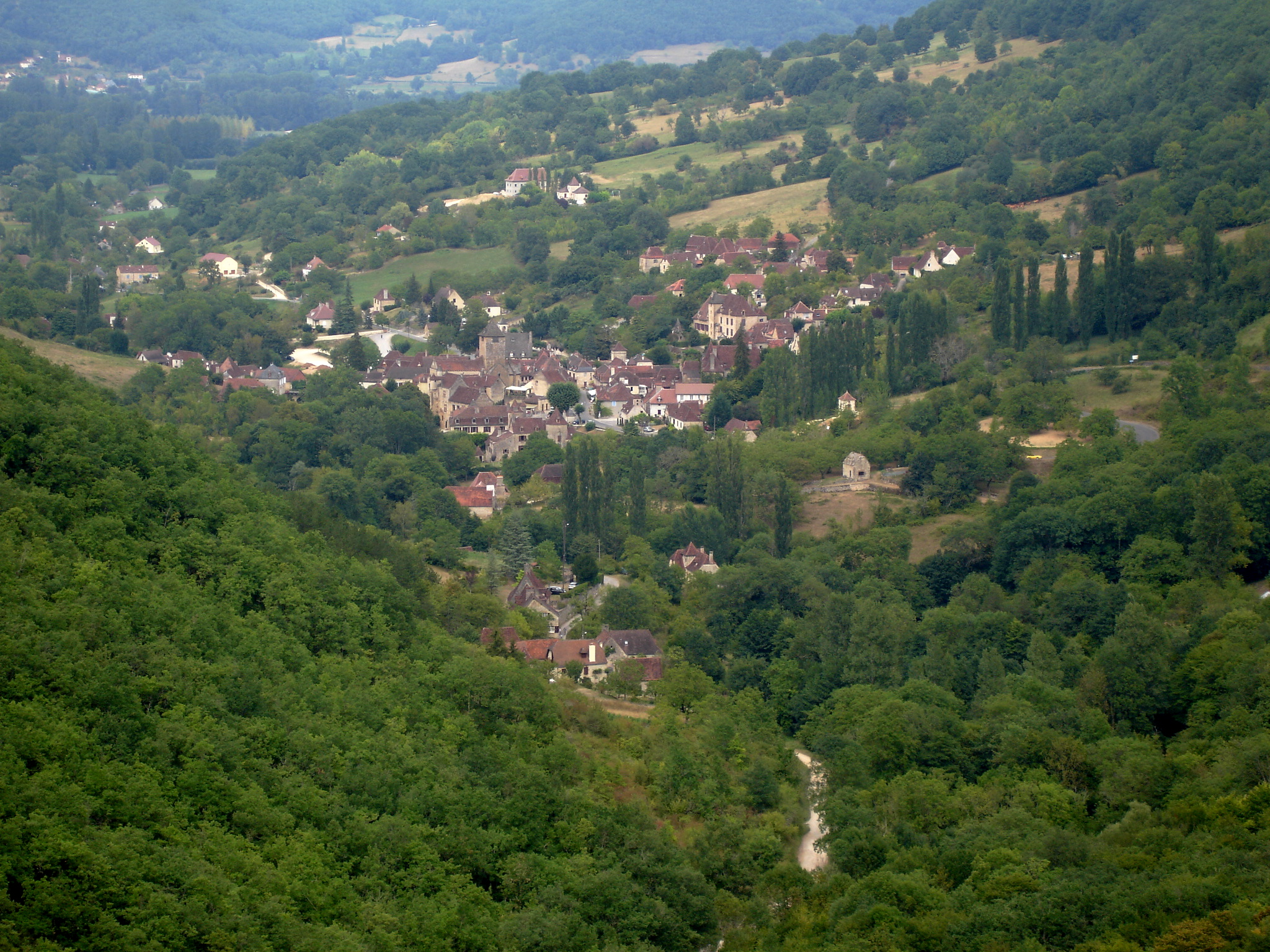 Vue sur le village d'Autoire depuis Siran, Lot, France.